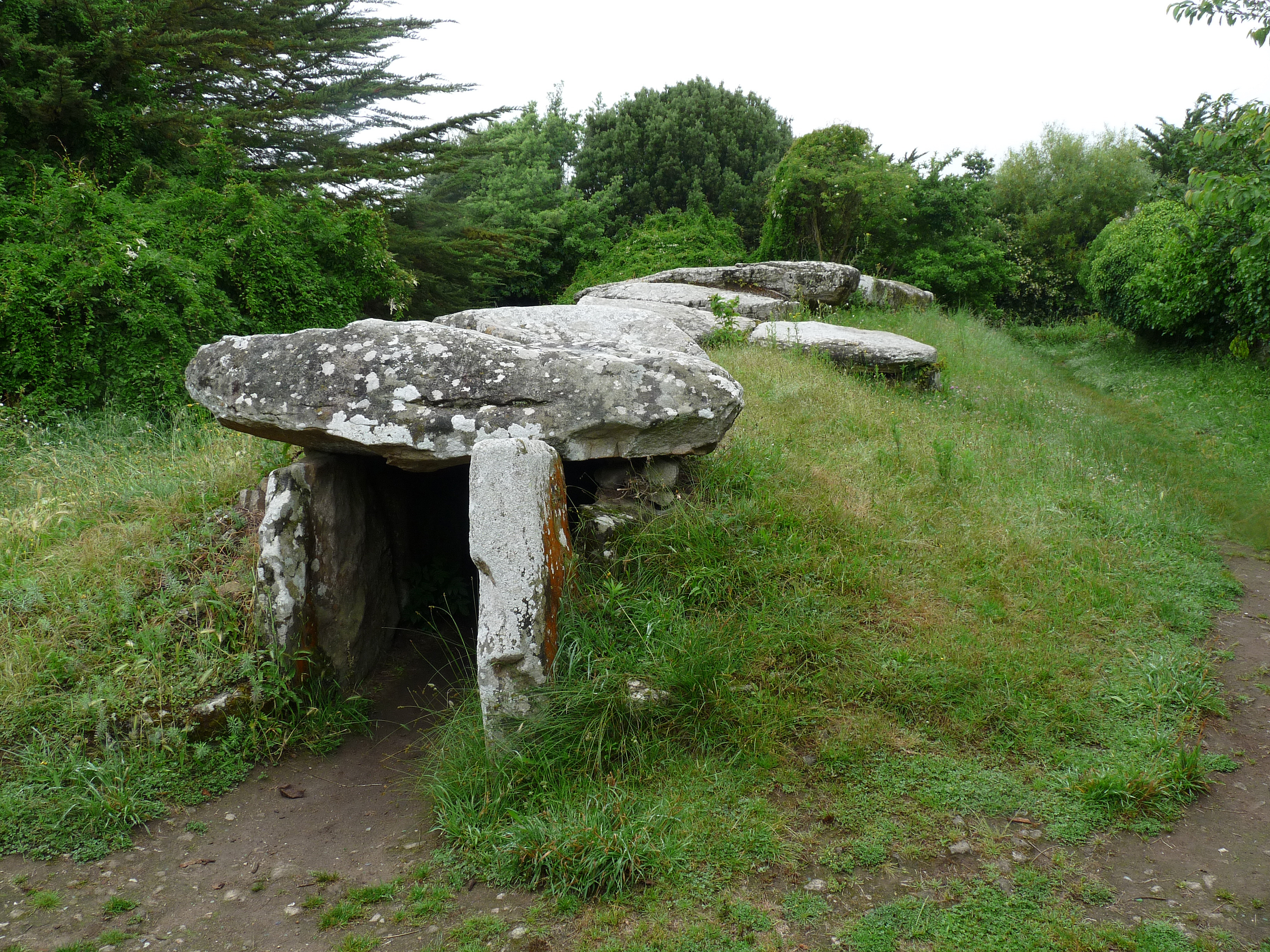 Dolmen du Mané Réthual à Locmariaquer (Morbihan)